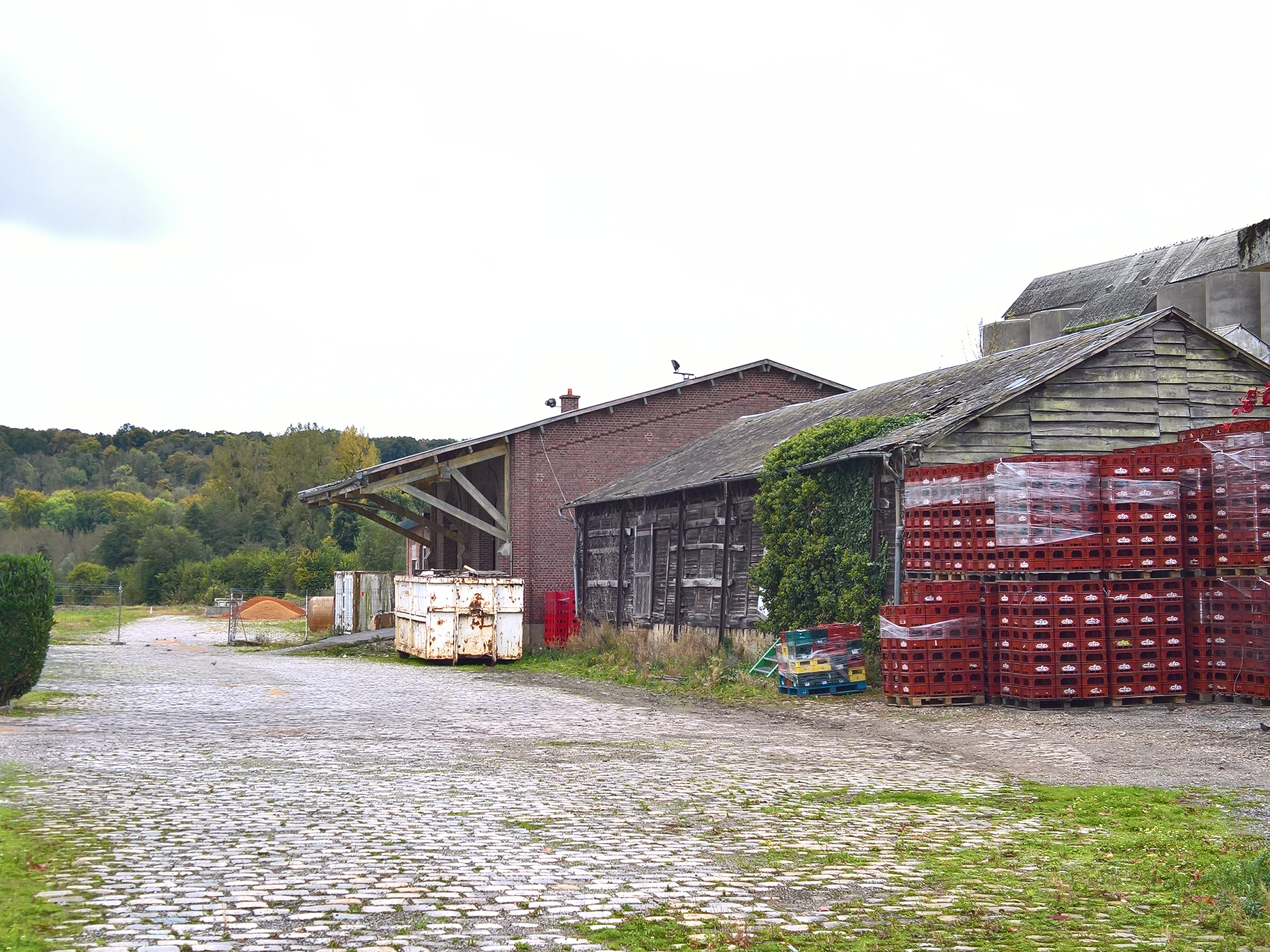 La cour marchandise et sa halle, en gare de Milly-sur-Thérain. Elles n'ont plus d'embranchement ferroviaire, et sont utilisées par le cidrier local.